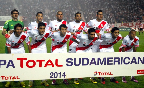 Una formación de River Plate durante la temporada 2014, en el partido de ida de la Copa Sudamericana frente a Estudiantes, cuando obtuvo el Torneo Final de Primera División y la Copa Campeonato.